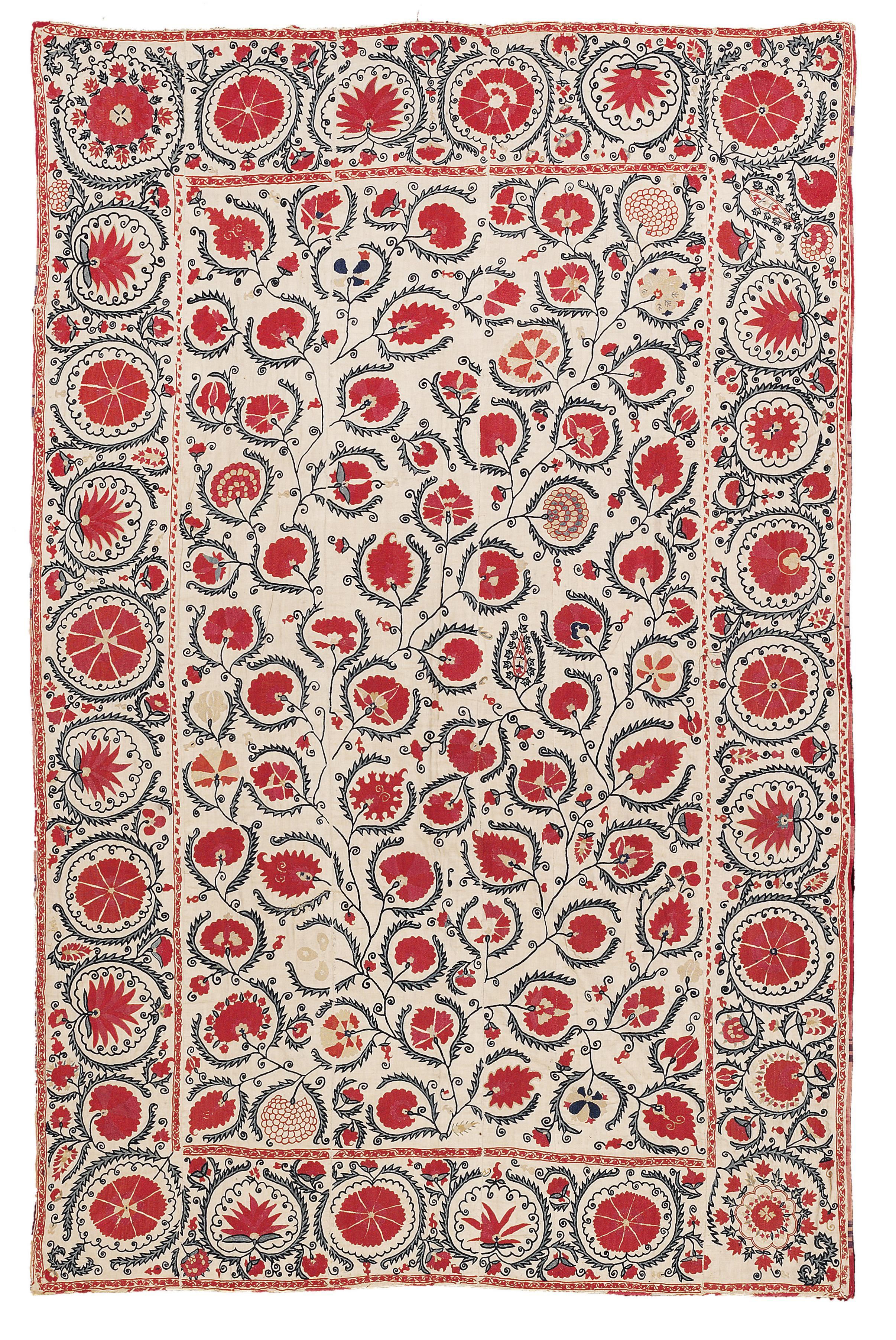 Bochara Susani, Usbekistan, ca. 242 x 165 cm, um 1850